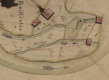 Els Ballesters, de Serrallonga, en el Cadastre napoleònic del 1812 (Arxius Departamentals dels Pirineus Orientals)